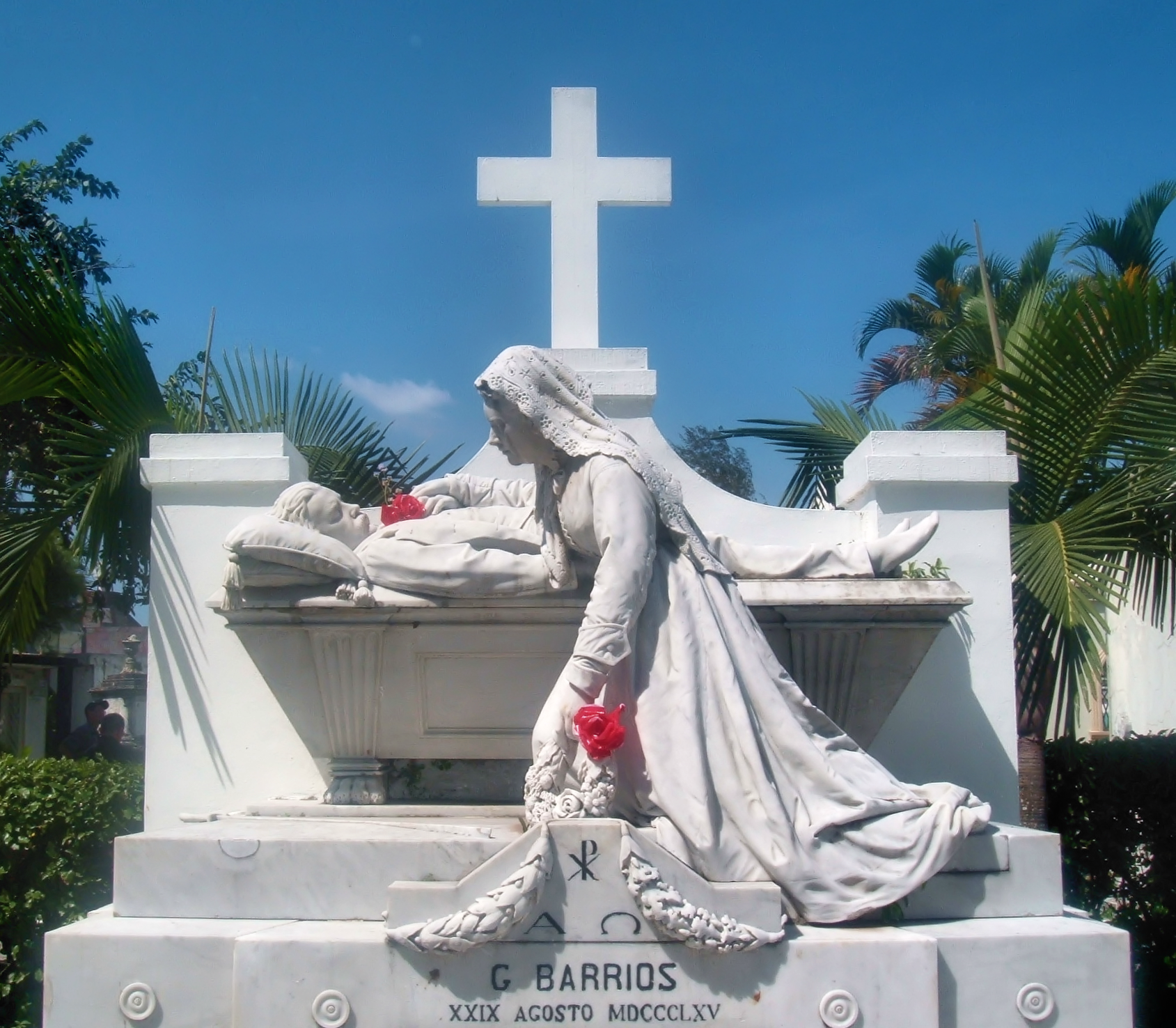 Gerardo Barrios' tomb(salvadorean patriot), in Cementerio de los Ilustres in San Salvador,El Salvador.